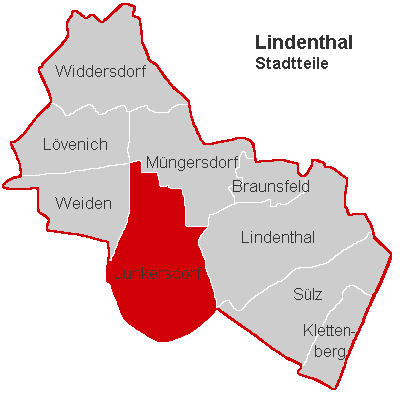 Lagekarte Junkersdorf im Stadtbezirk Köln-Lindenthal